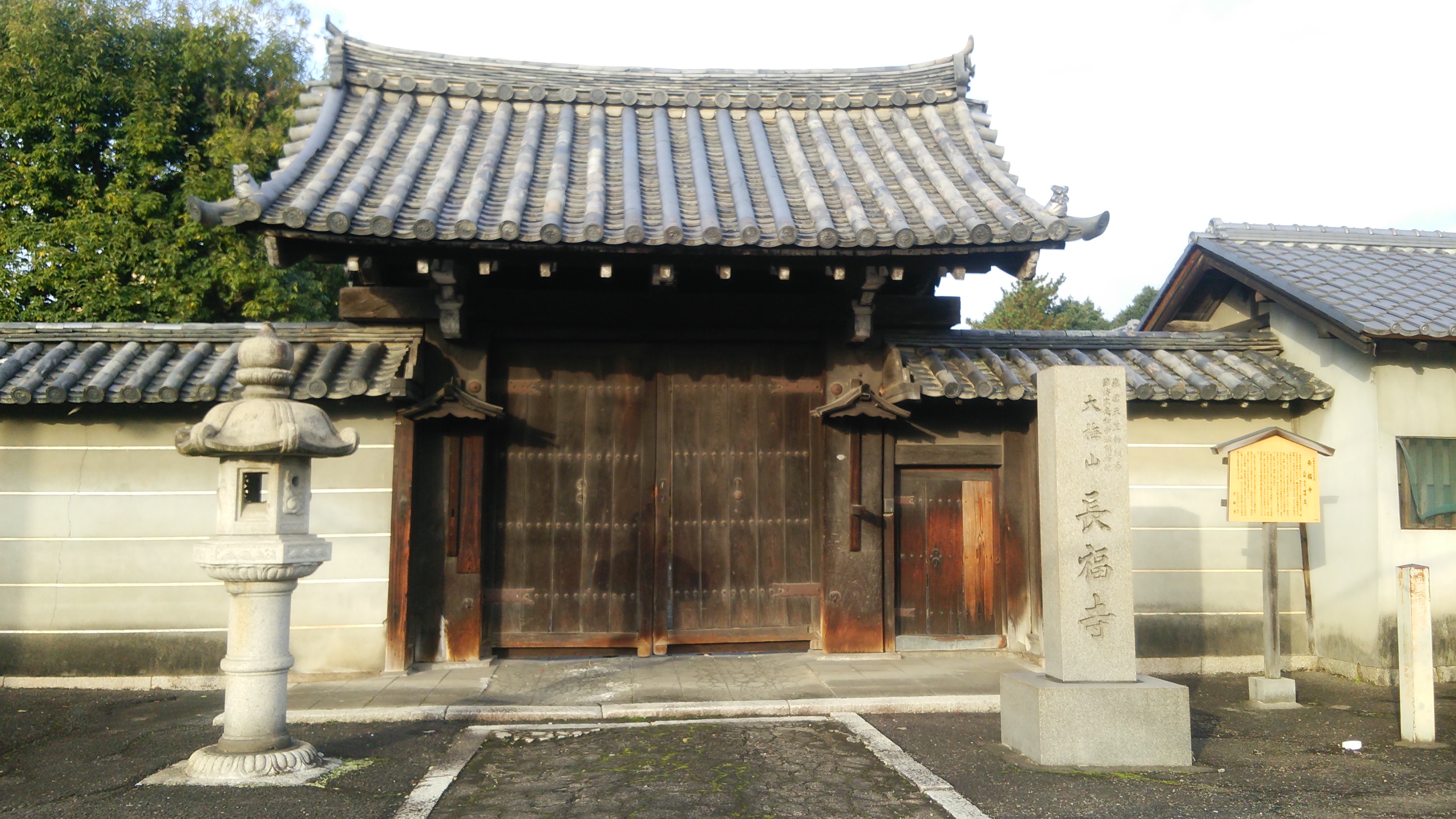 姉妹の椿山大姉が入っていた是心院。京都の長福寺。